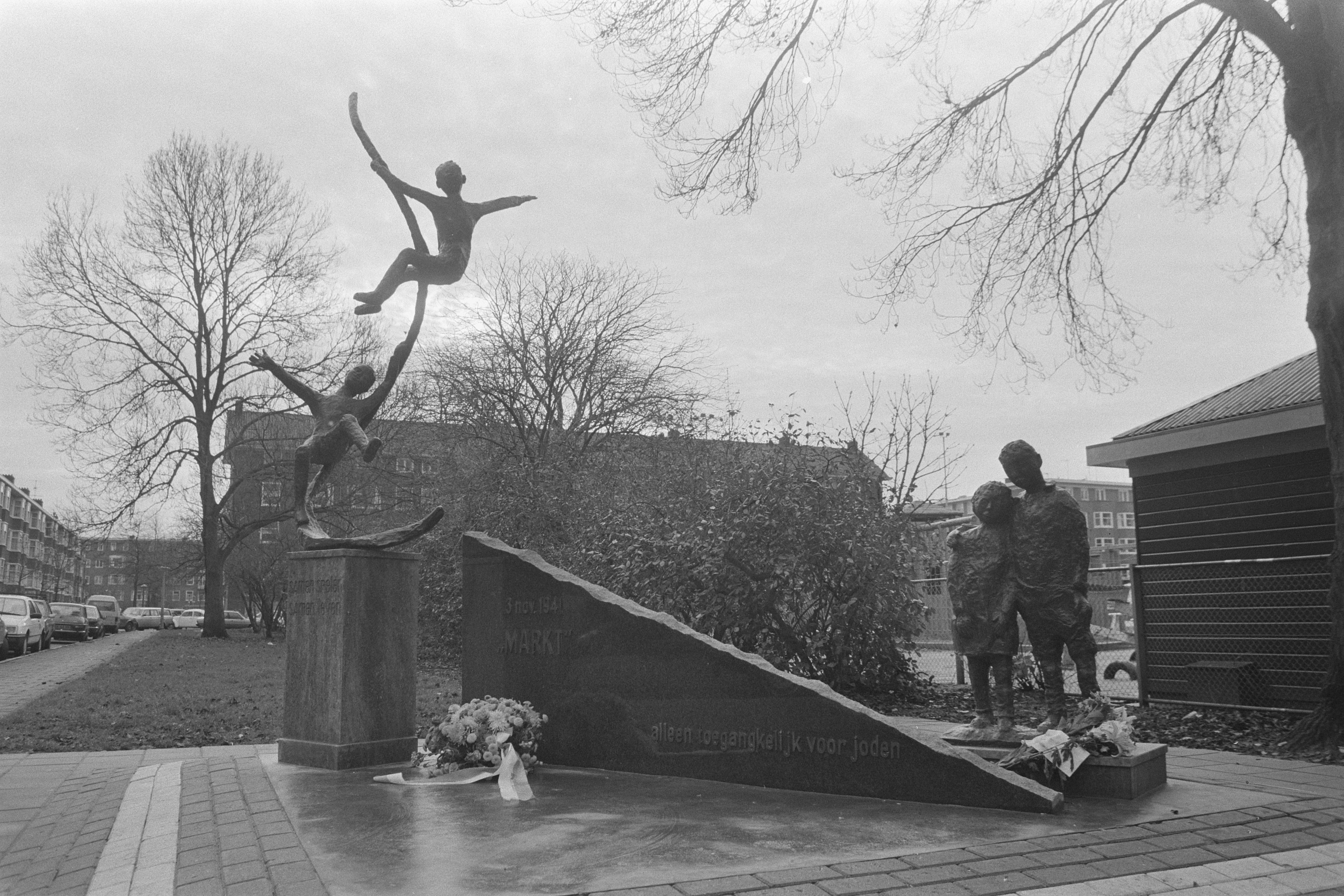 Collectie / Archief : Fotocollectie Anefo Reportage / Serie : [ onbekend ] Beschrijving : Het monument dat de 'Markt voor Joden' herdenkt Annotatie : Op 3 november 1941 werd op bevel van de Duitse bezetter de speeltuin aan de Gaaspstraat een “Markt voor Joden”. Alleen hier mochten zij nog kopen en verkopen. Velen van hen werden vanaf deze plaats weggevoerd. Van de 17.000 Joodse buurtbewoners werden 13.000 vermoord. Voor hen maakte Truus Menger het Kindermonument. Elk jaar op 3 november wordt de Markt voor Joden herdacht. Datum : 2 december 1986 Locatie : Amsterdam, Noord-Holland Trefwoorden : oorlogsmonumenten Fotograaf : Molendijk, Bart / Anefo, [onbekend] Auteursrechthebbende : Nationaal Archief Materiaalsoort : Negatief (zwart/wit) Nummer archiefinventaris : bekijk toegang 2.24.01.05 Bestanddeelnummer : 933-8312